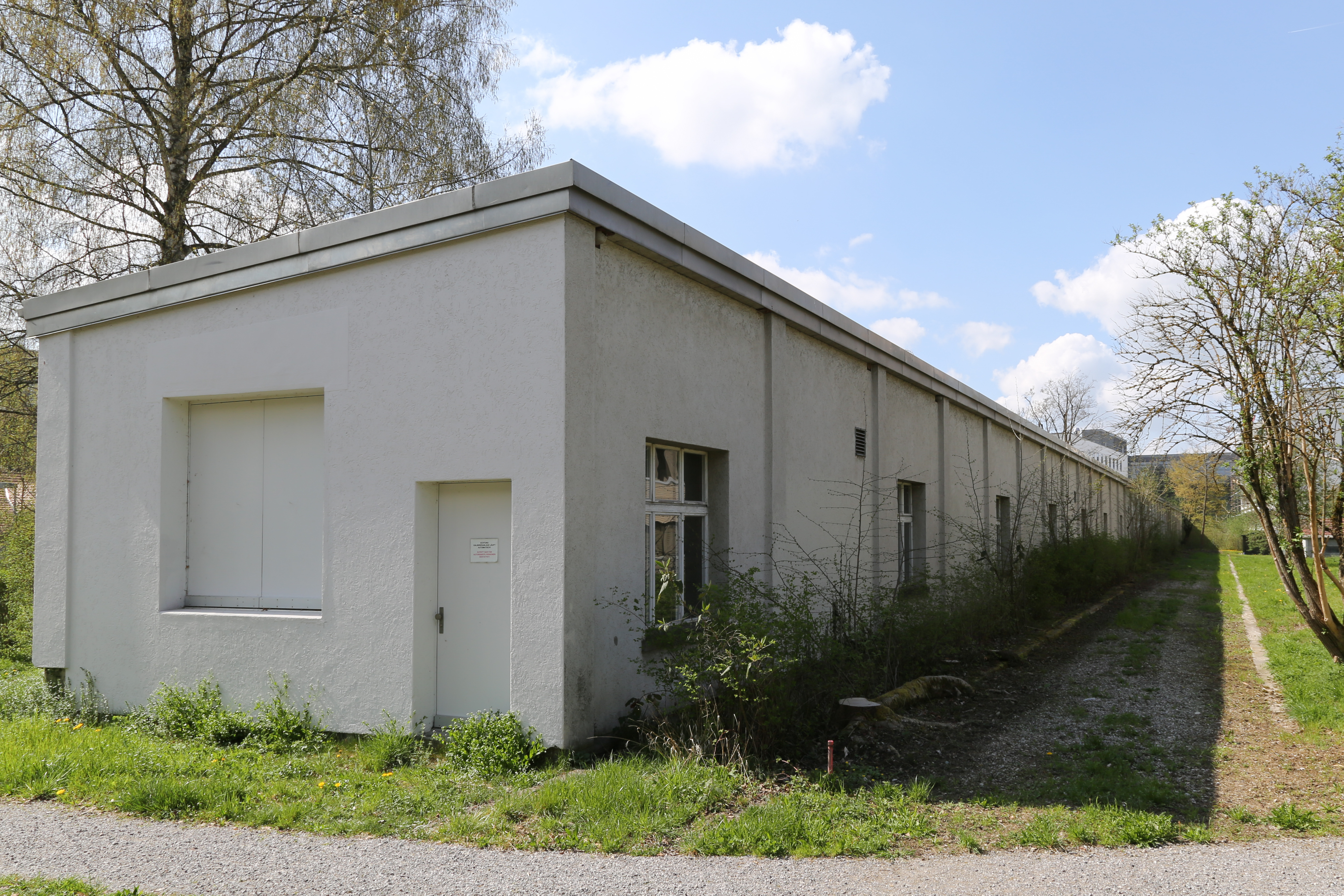 Kalibrierstelle für hydrometrische Messgeräte des METAS in Ittigen, Ansicht aus östlicher Richtung